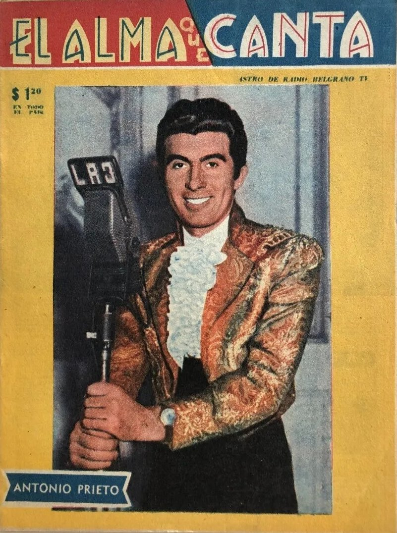 Portada de la revista argentina El Alma que Canta N° 1633 de 1954. En la fotografía el cantante chileno Antonio Prieto